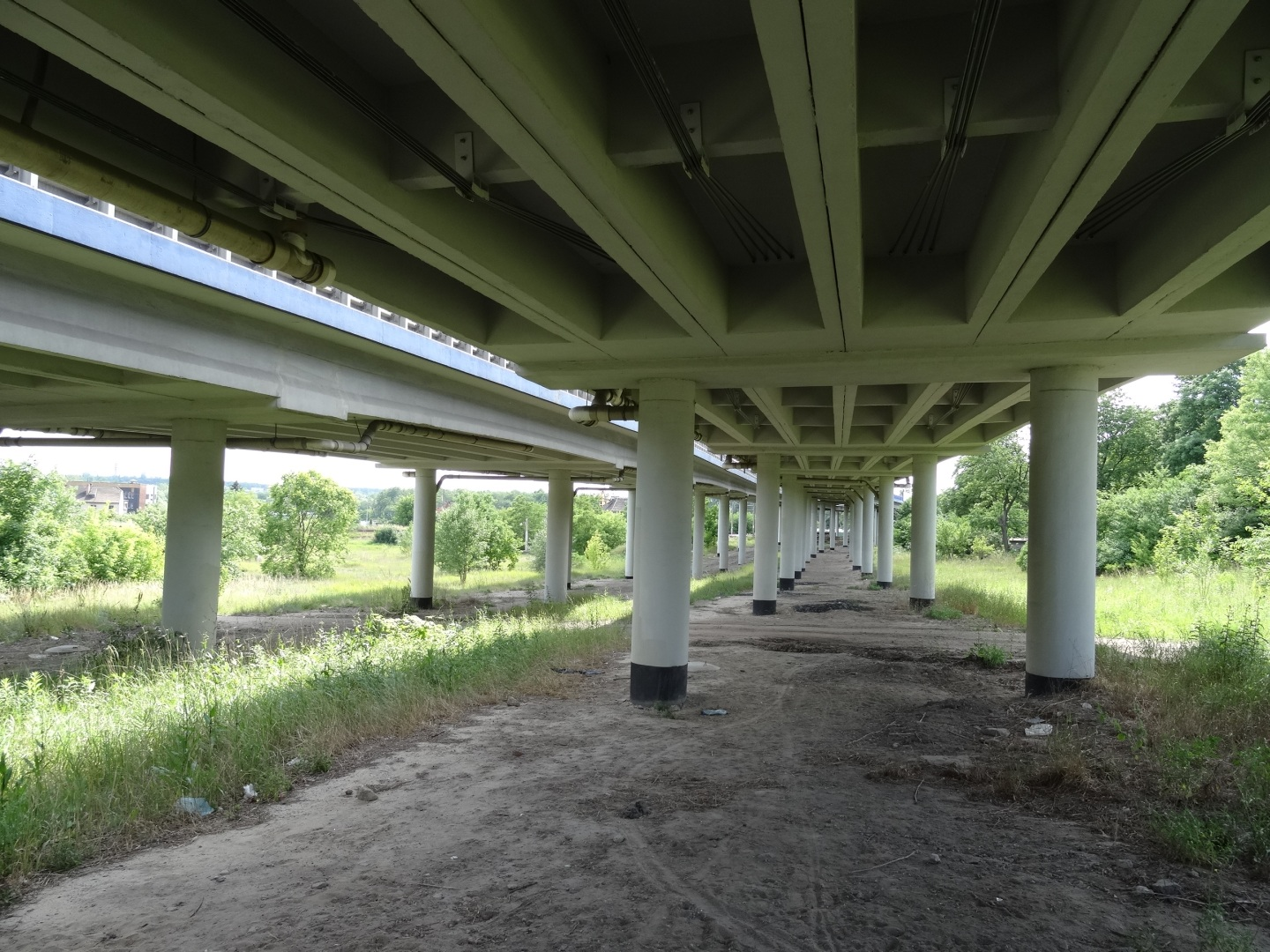 Wiadukty Warszawskie w Bydgoszczy w ciągu drogi krajowej nr 80